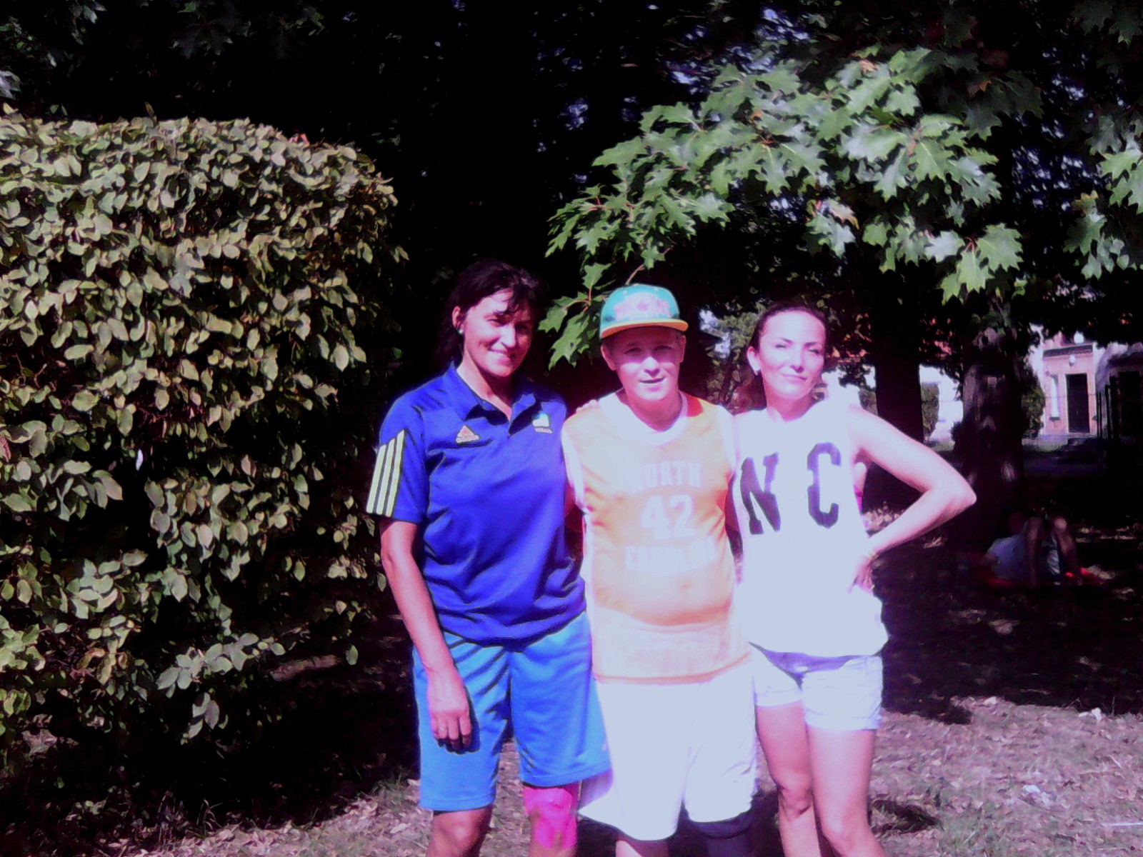 Олена Вергун (крайня ліворуч) під час "Мужик-фесту". Київ. 19 вересня 2015